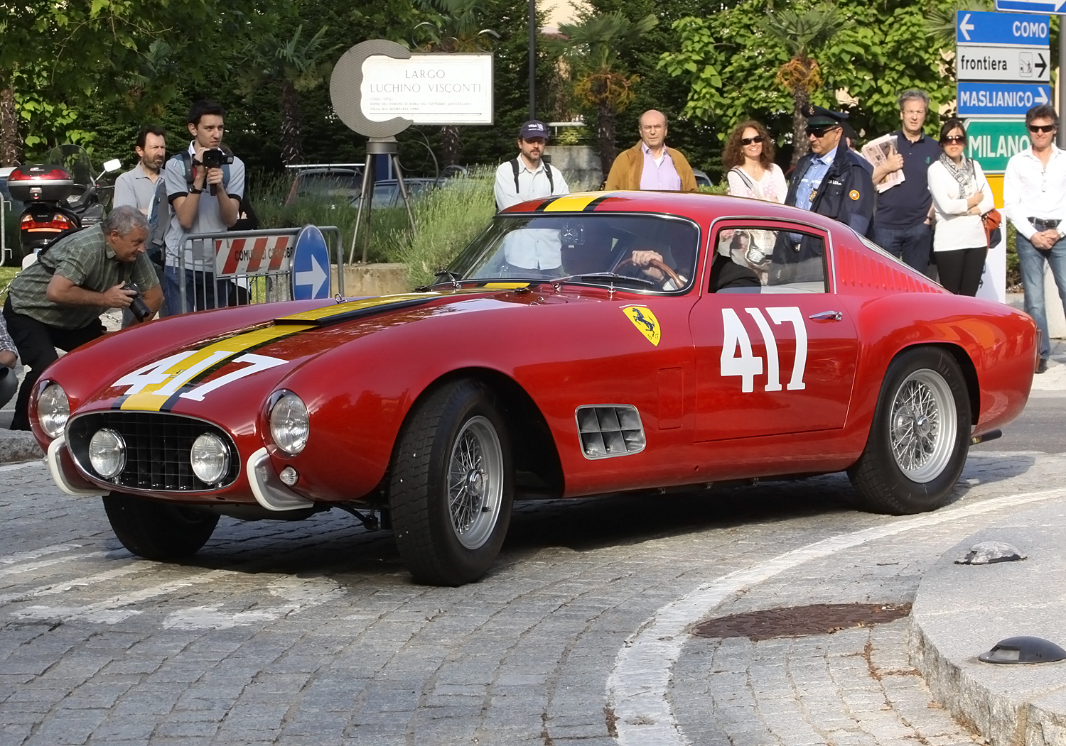 1957 Ferrari 250 GT Berlinetta Tour de France Scaglietti at Concorso d'eleganza Villa d'Este 2014.